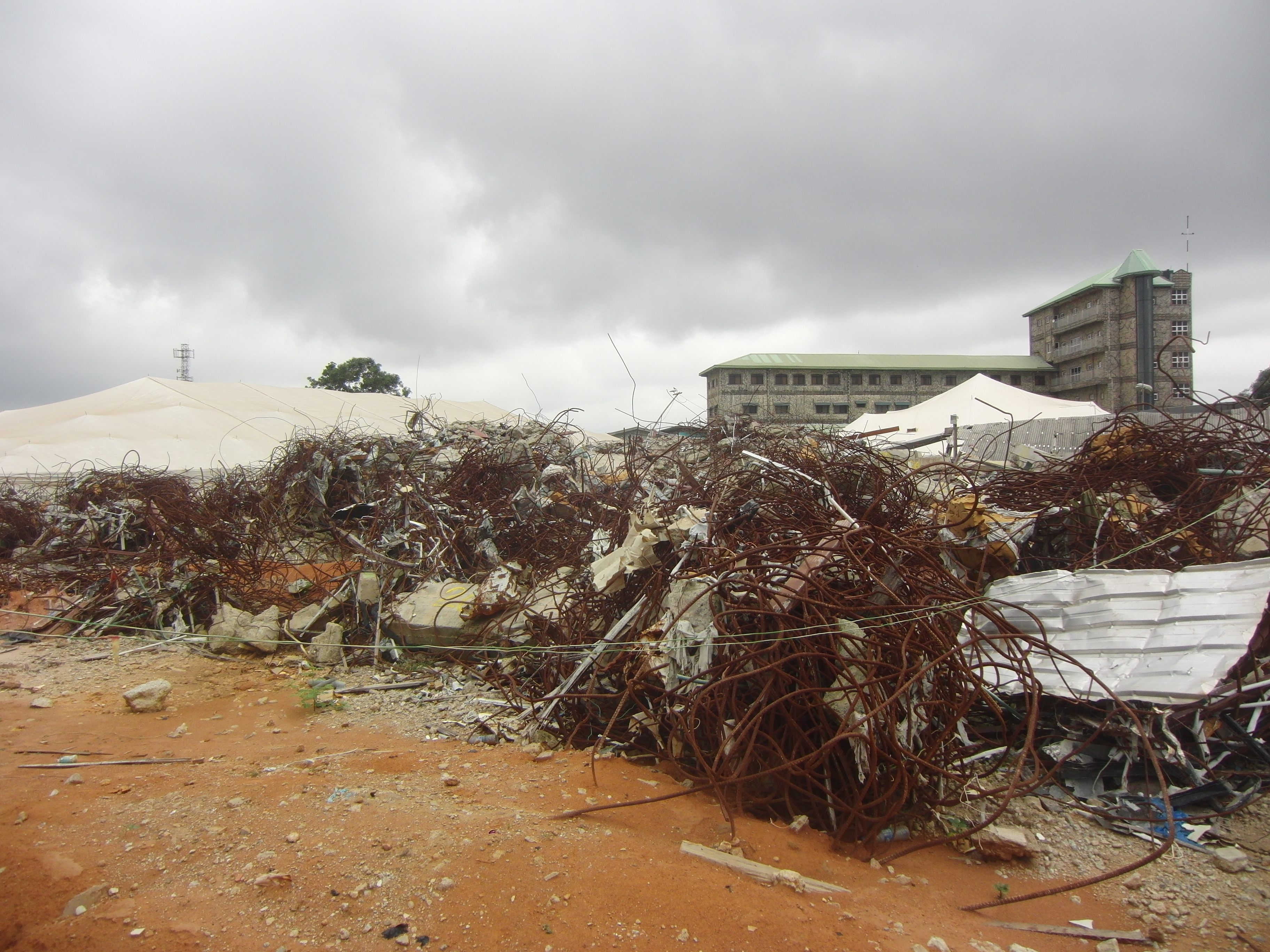 Der Trümmerhaufen des eingestürzten Gebäudes.